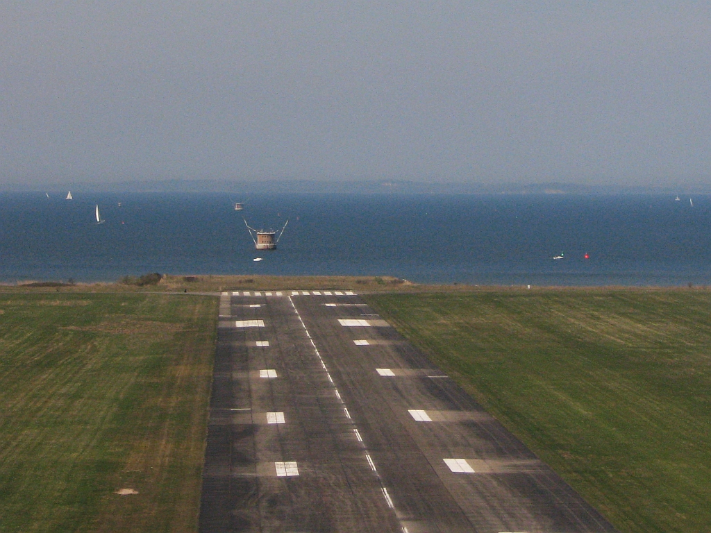 Luftbild der Start- bzw Landebahn mit Befeuerung nach Nordwest in der Ostsee am Sonderflugplatz Peenemünde auf der Insel Usedom Mecklenburg-Vorpommern - Foto Wolfgang Pehlemann Steinberg DSCN5540